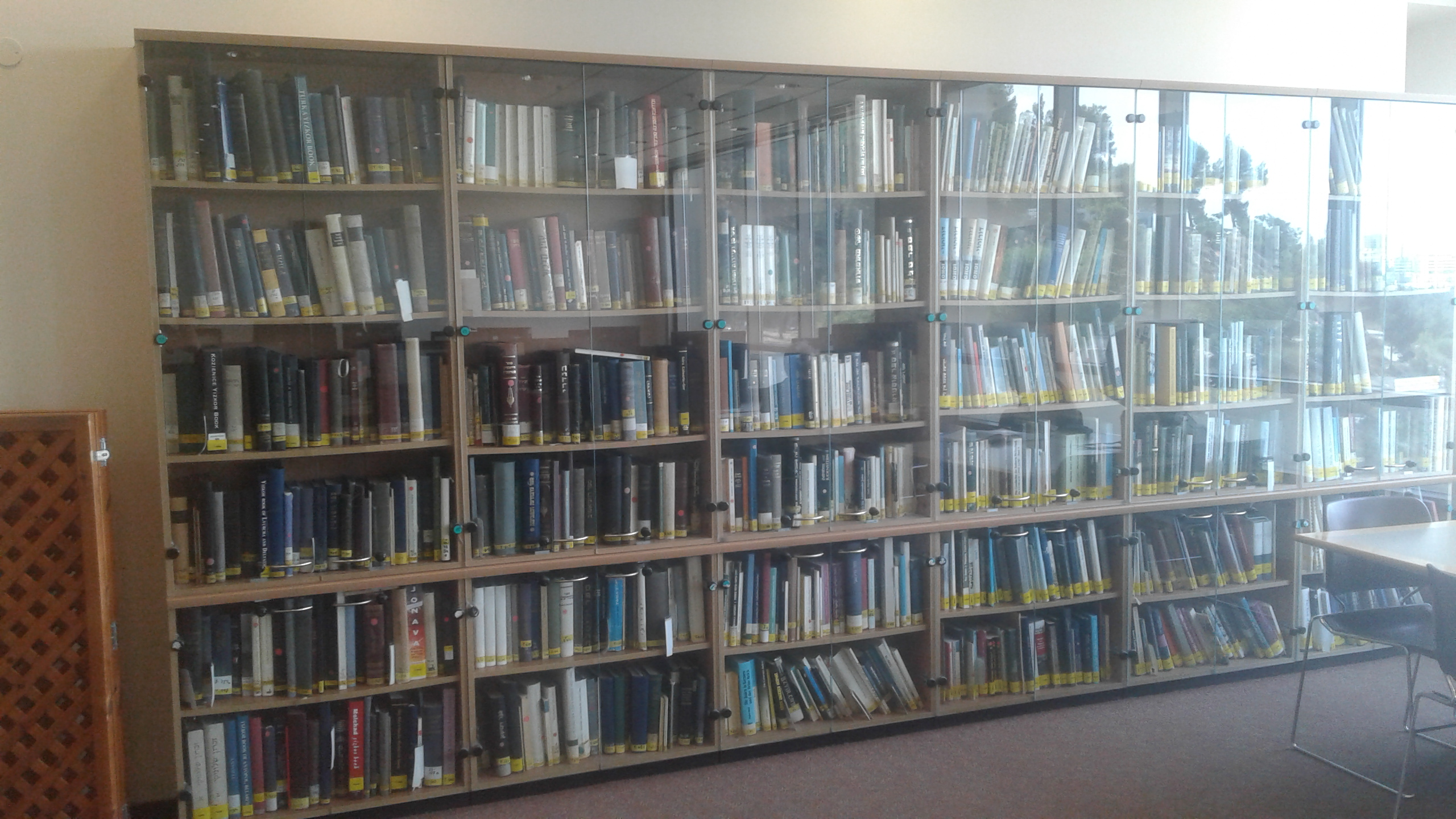 חלק ממדפי ספרי היזכור באולם הקריאה בספריית יד ושם